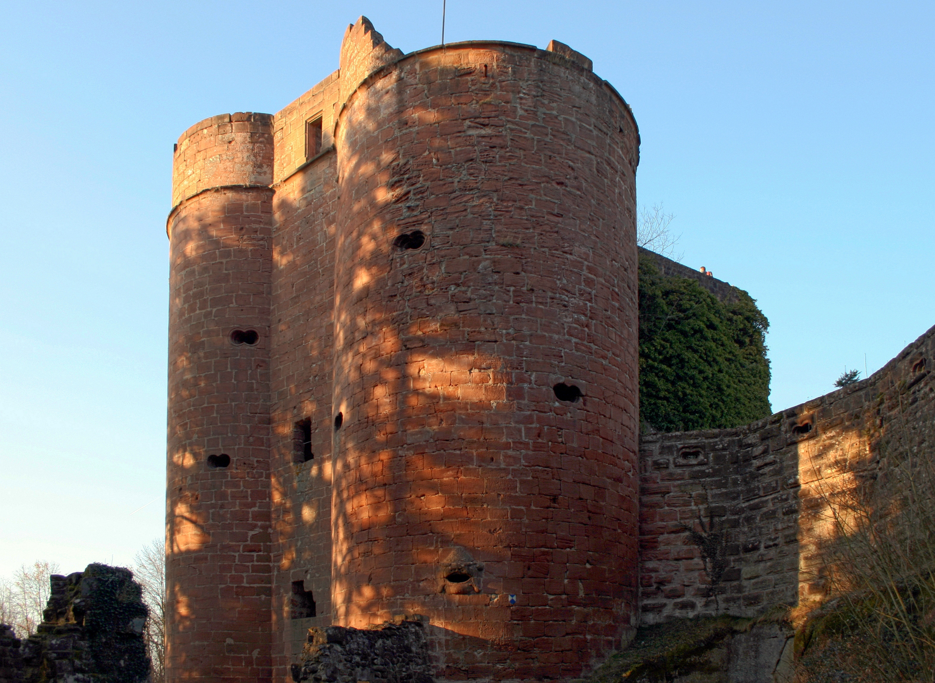 Burg Neudahn, Ansicht von Sueden.